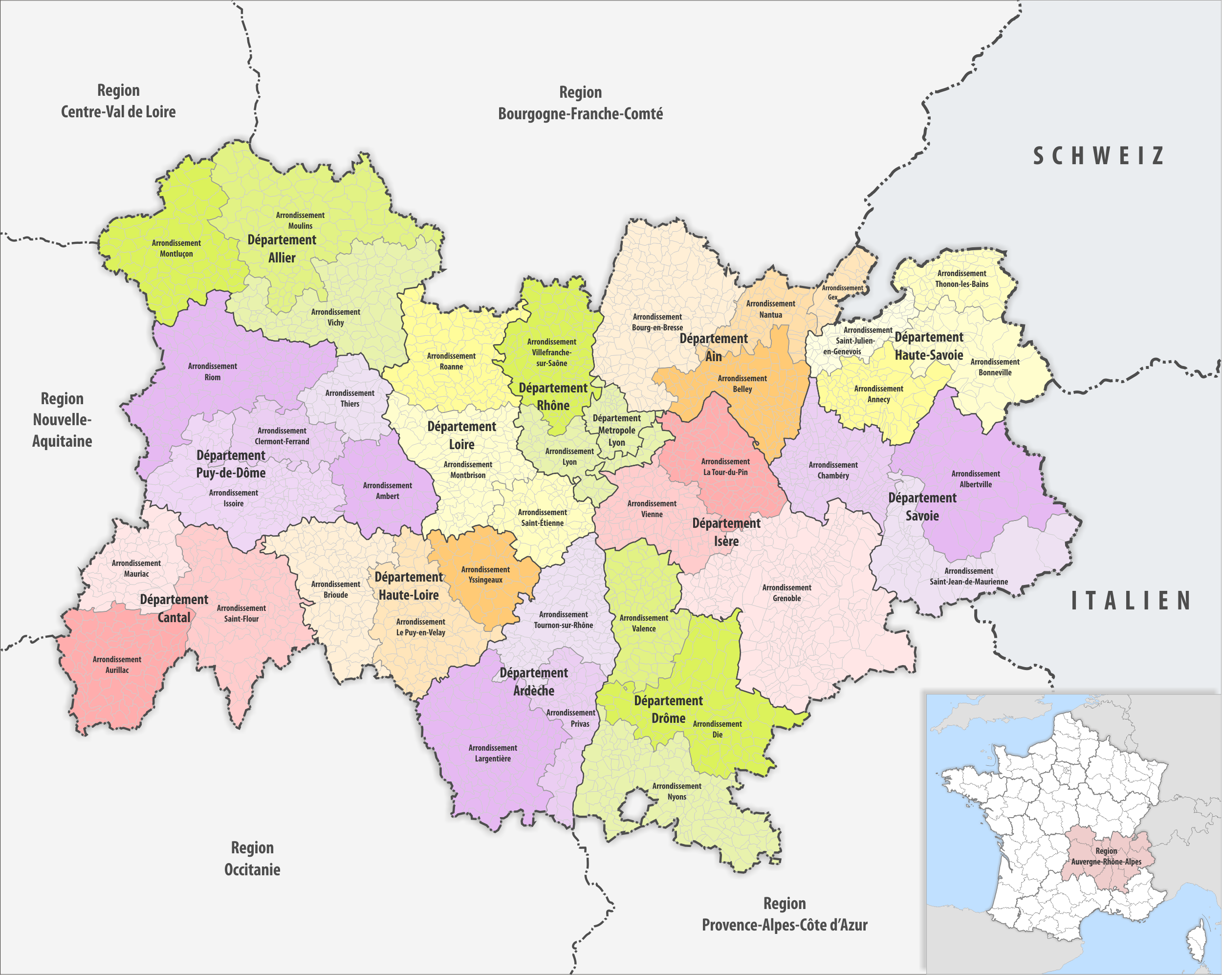 Gemeinden, Arrondissemente und Departemente in der Region Auvergne-Rhône-Alpes